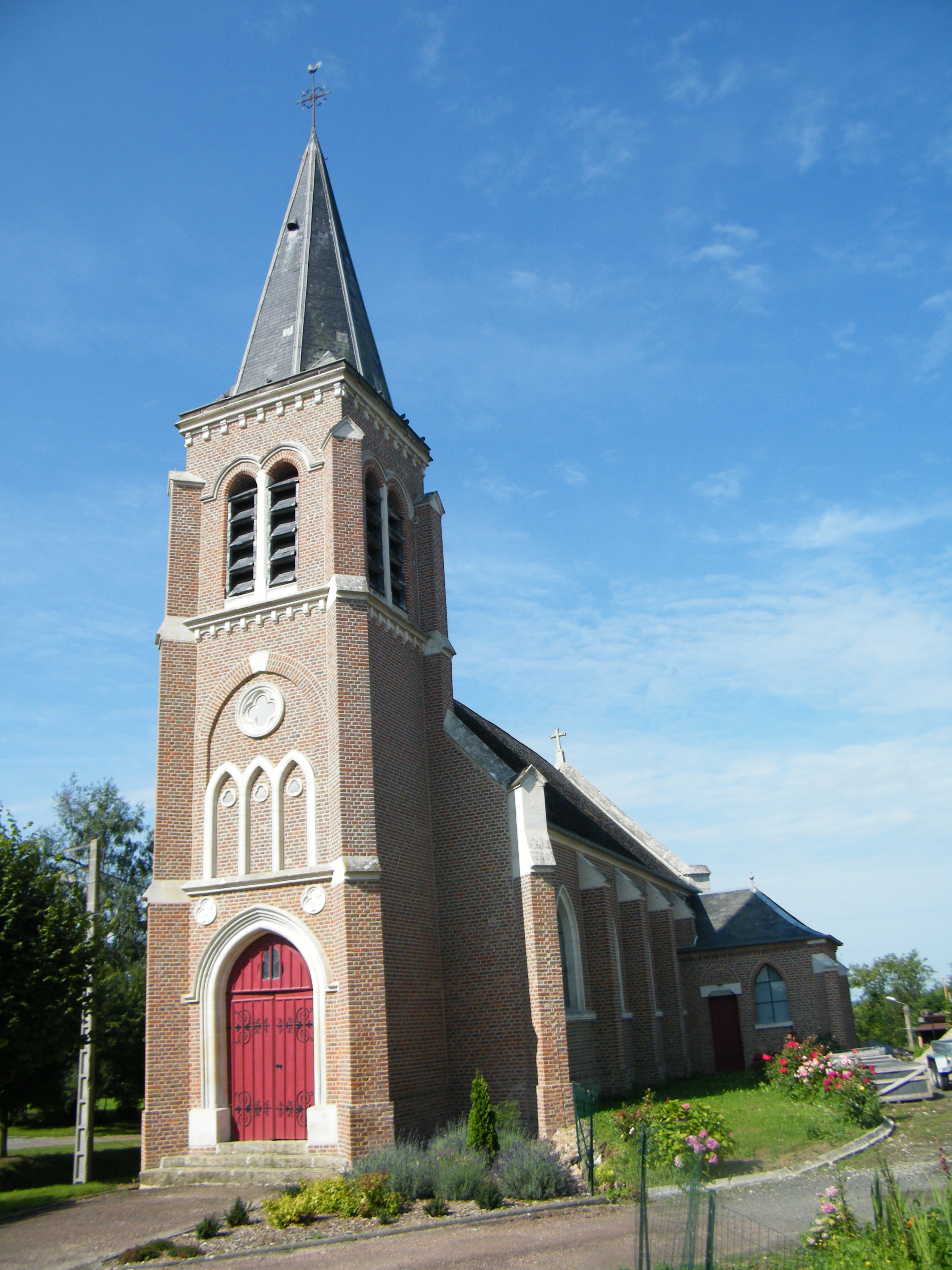 église.